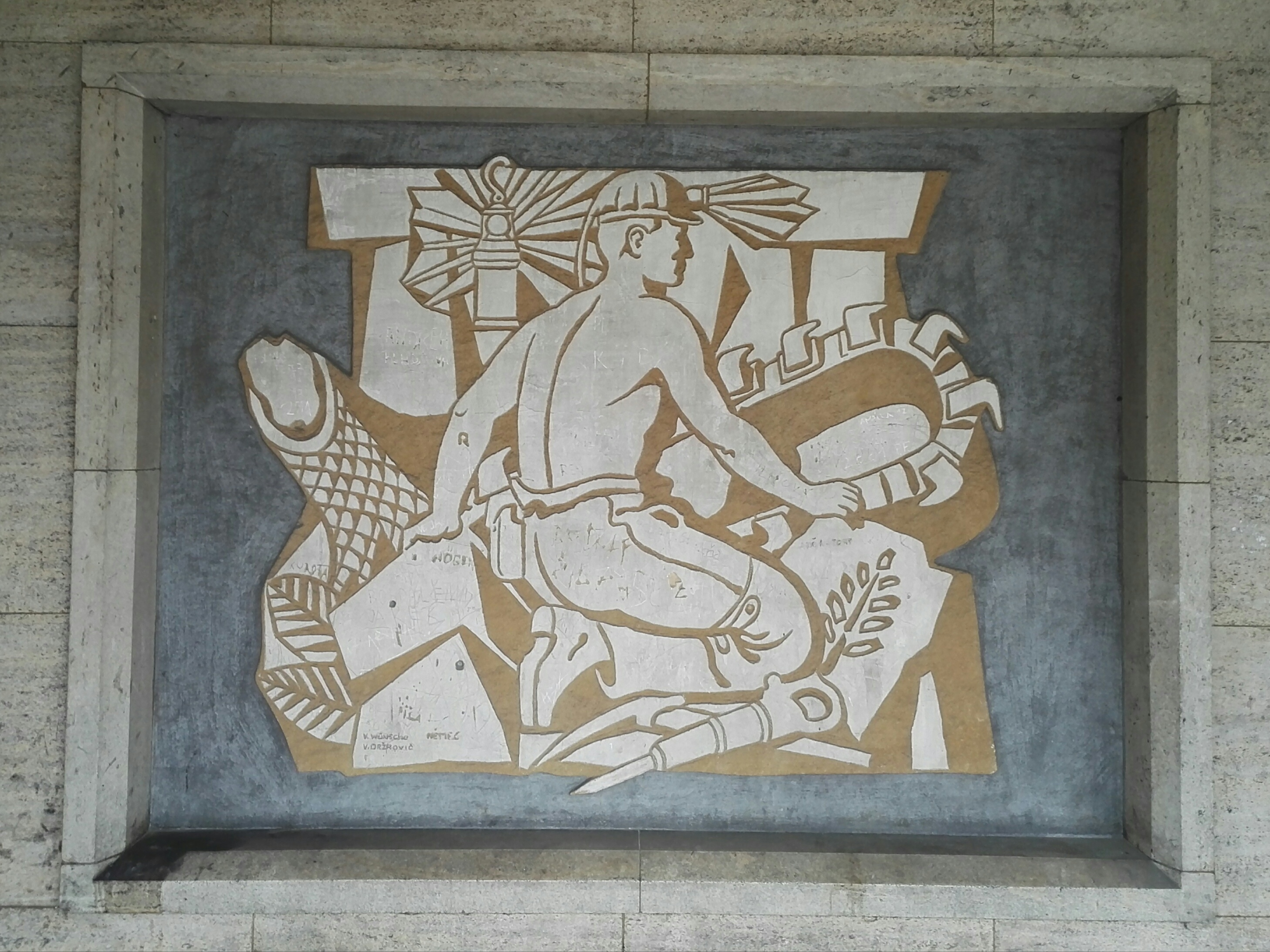 Ostrava. Sgrafito «Horník» u vchodu do Hornické polikliniky.